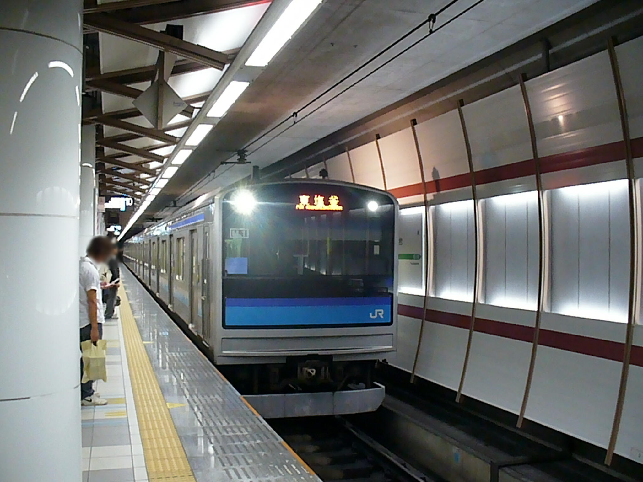 仙台駅10番線ホーム